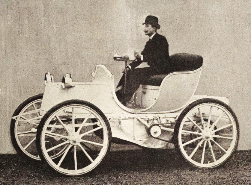 Le Comte Gaston de Chasseloup-Laubat, sur Jeantaud Duc électrique en 1899 - La Vie au Grand Air du 26 novembre 1903, p.889